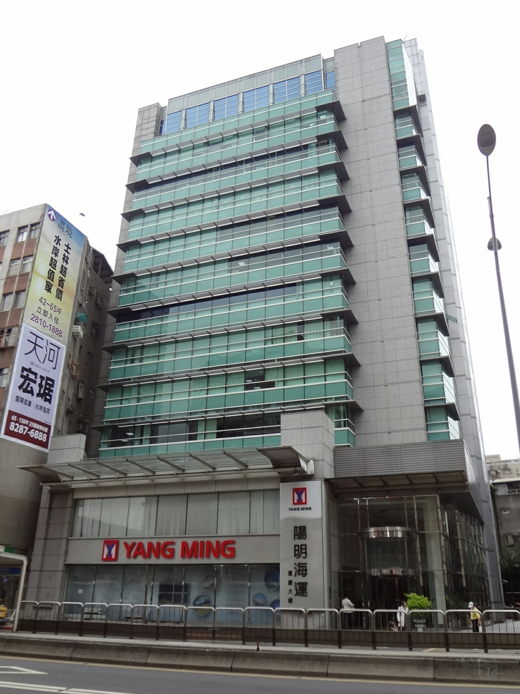 中文（台灣）: 陽明海運重慶大樓，原南山人壽重慶大樓，位於臺北市大同區重慶北路二段243號，好好國際物流總部設於4至5樓。